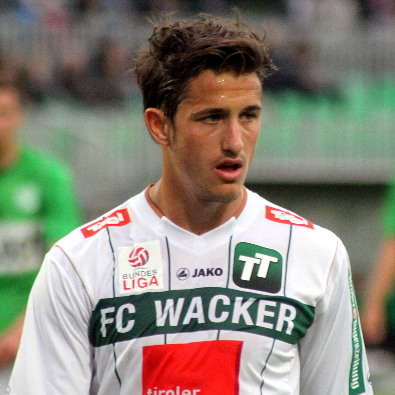 Meisterschaftsspiel der österreichischen Bundesliga: SV Mattersburg gegen FC Wacker Innsbruck am 7. April 2013 (0:0)] im Mattersburger Pappelstadion.] - Das Foto zeigt Thomas Bergmann (FC Wacker Innsbruck). Object location47° 44′ 21.66″ N, 16° 24′ 23.13″ E